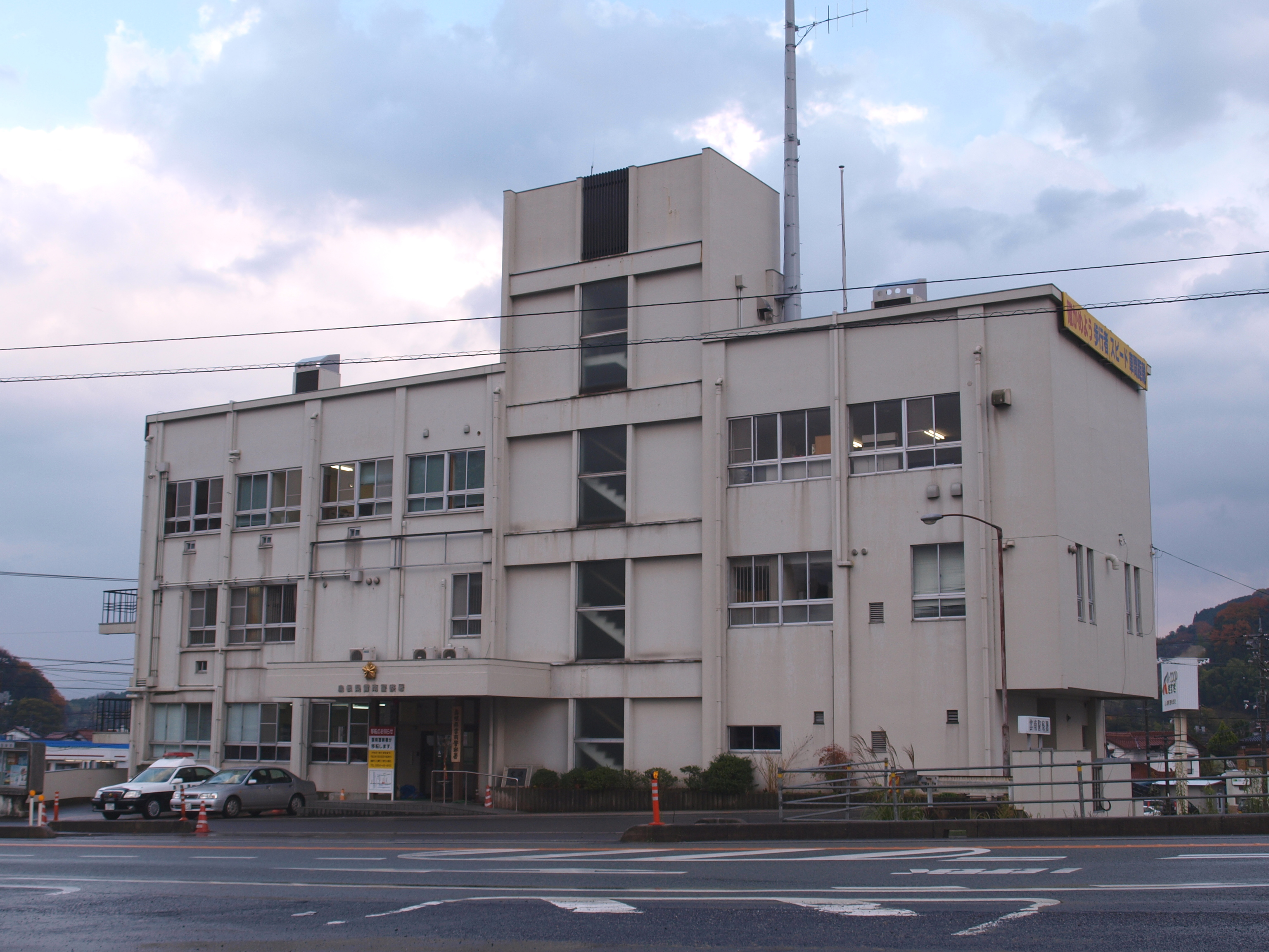 島根県警 雲南警察署の写真。